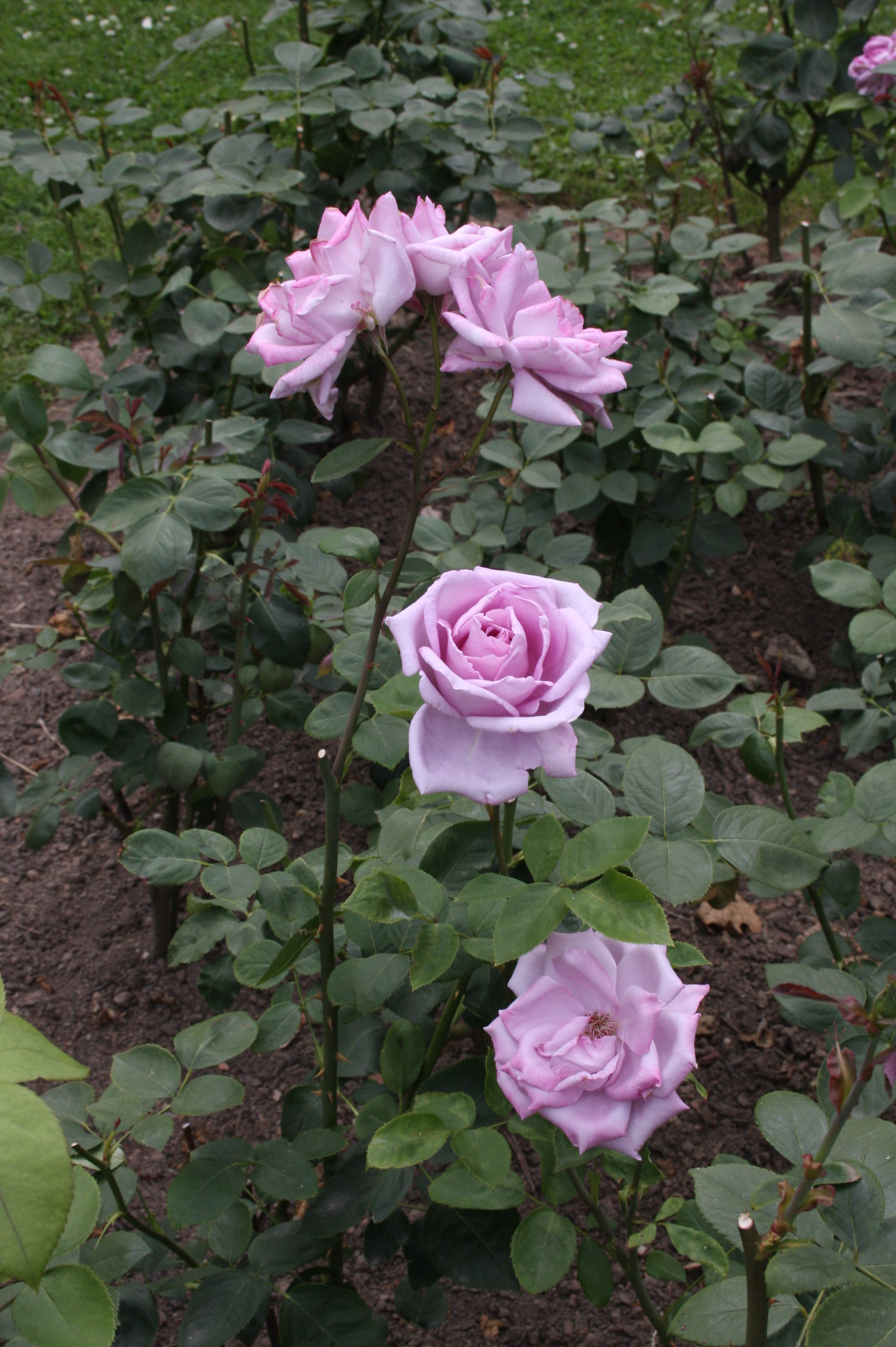 Die Edelrose 'Mainzer Fastnacht', gezüchtet 1964 von Mathias Tantau jun..